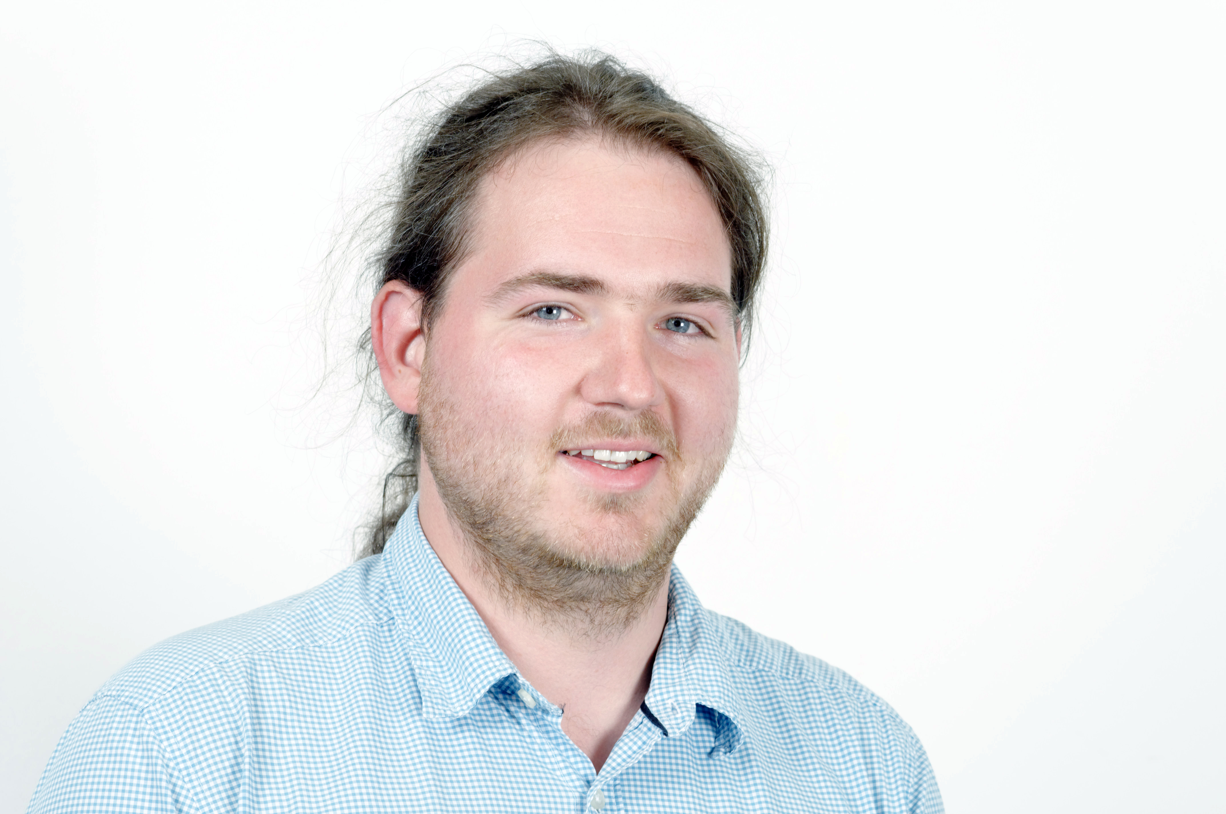 Matthias Bärwolff - Mitglied des Thüringer Landtages